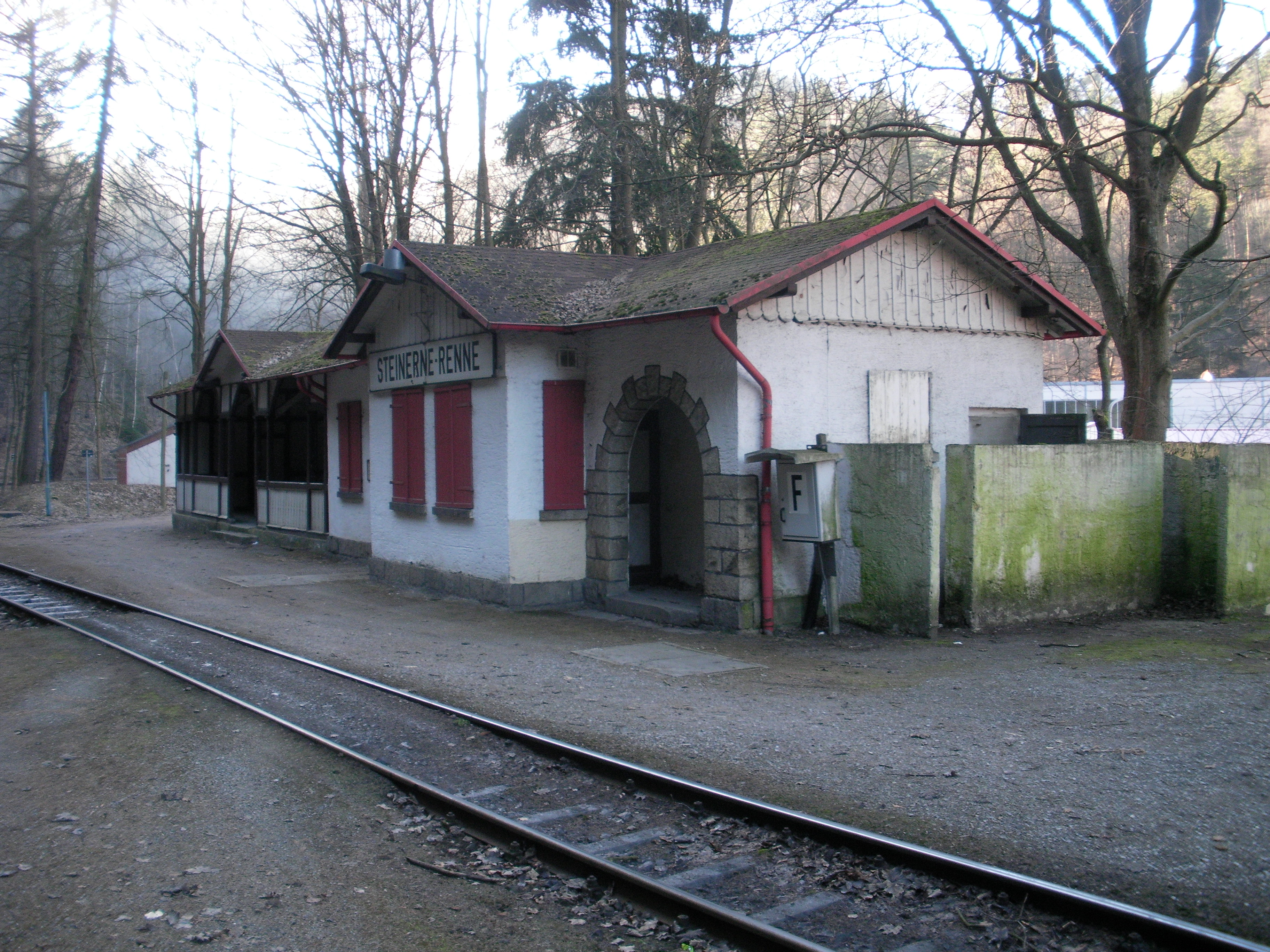 Bahnhof Steinerne Renne der Brocken- und Harzquerbahn